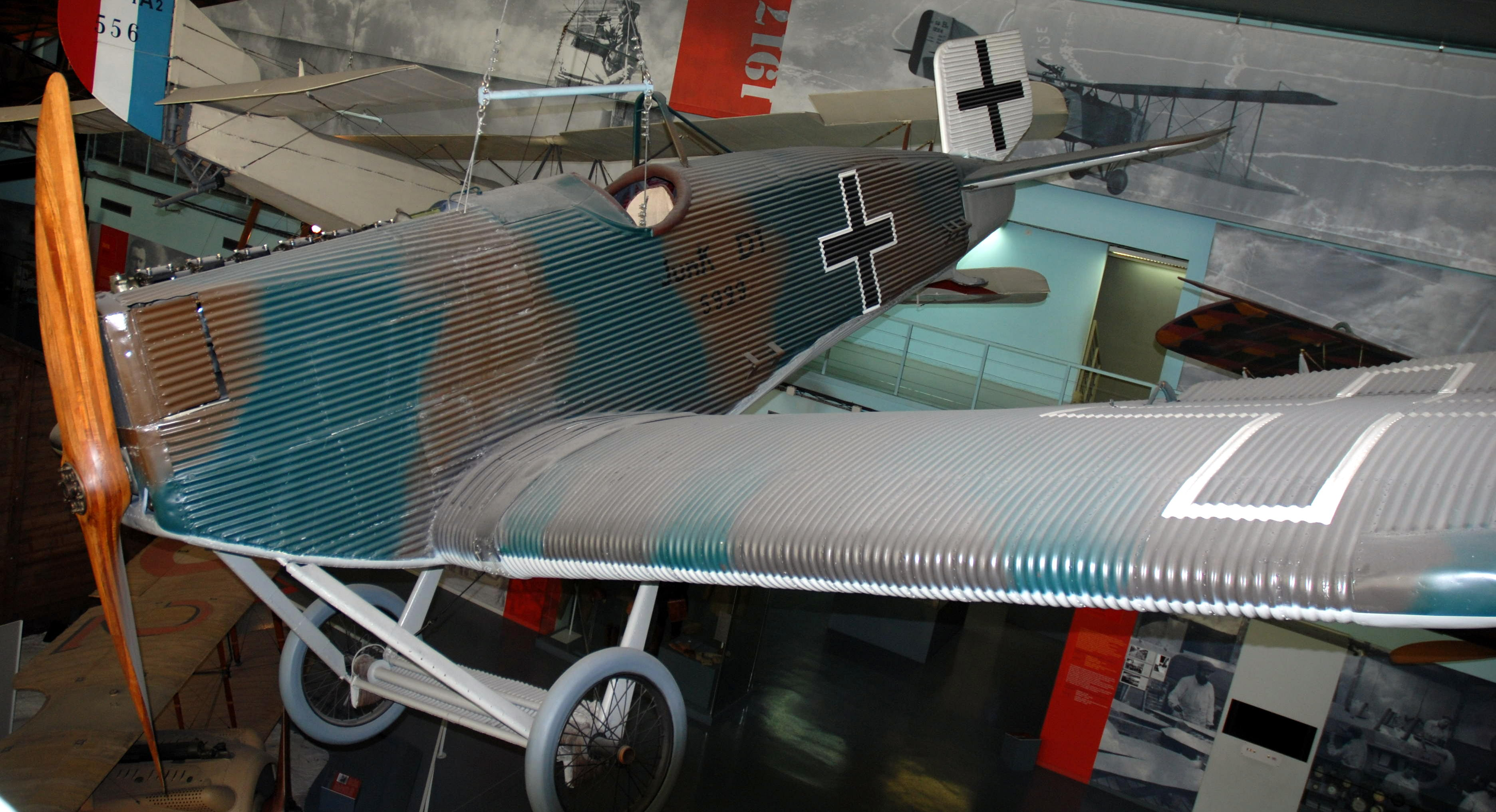 Junkers J.9 (DI), Musée de l'Air et de l'Espace, Le Bourget, France.